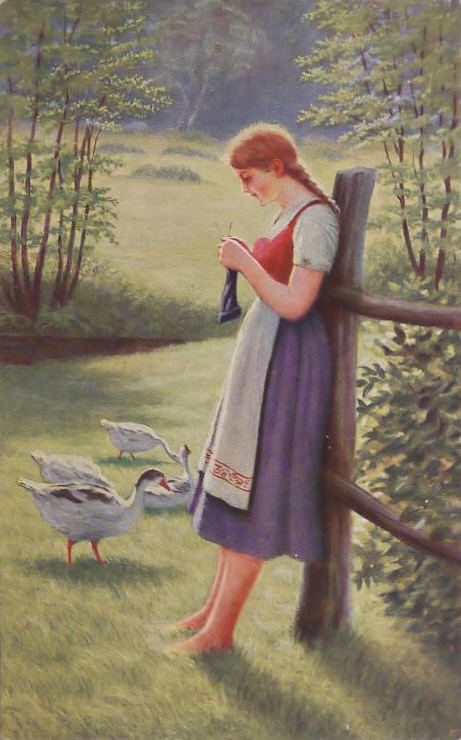 Gänseliesel, Ansichtskarte nach einem Gemälde von Adolf Hering